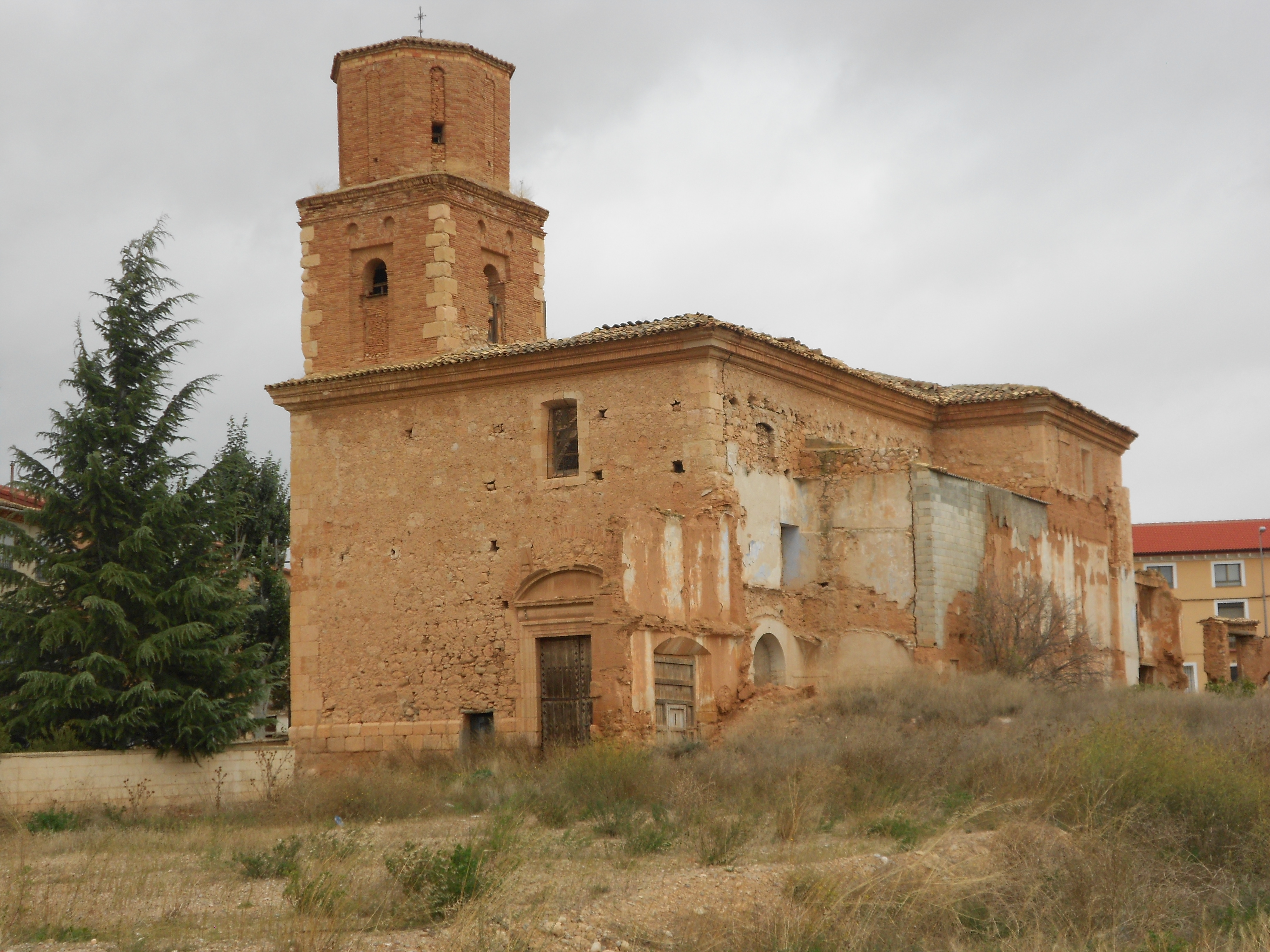 Convento de San Francisco (Ariza, Aragón).